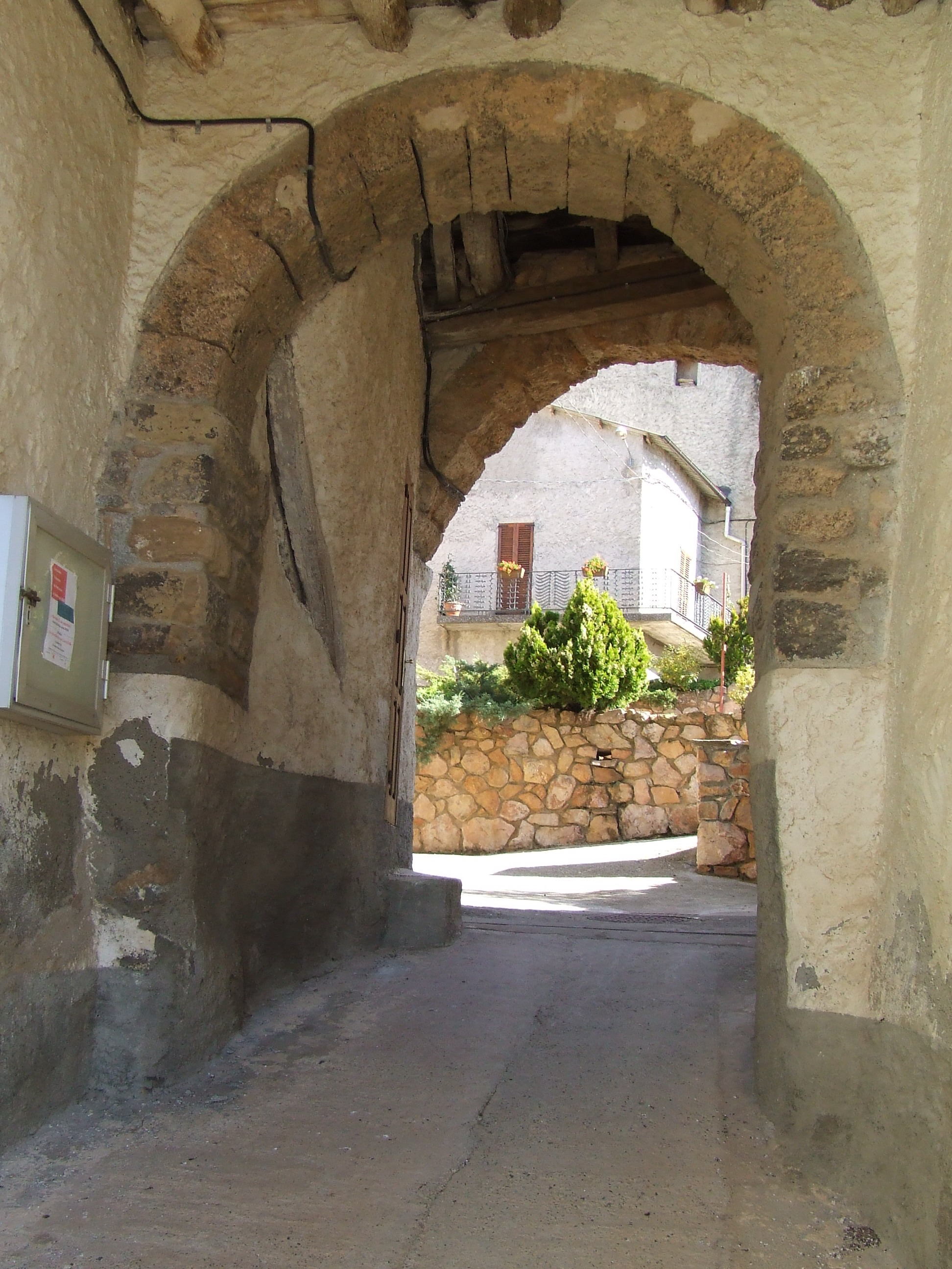 Restes del castell de Benavent de la Conca (Isona i Conca Dellà, Pallars Jussà)